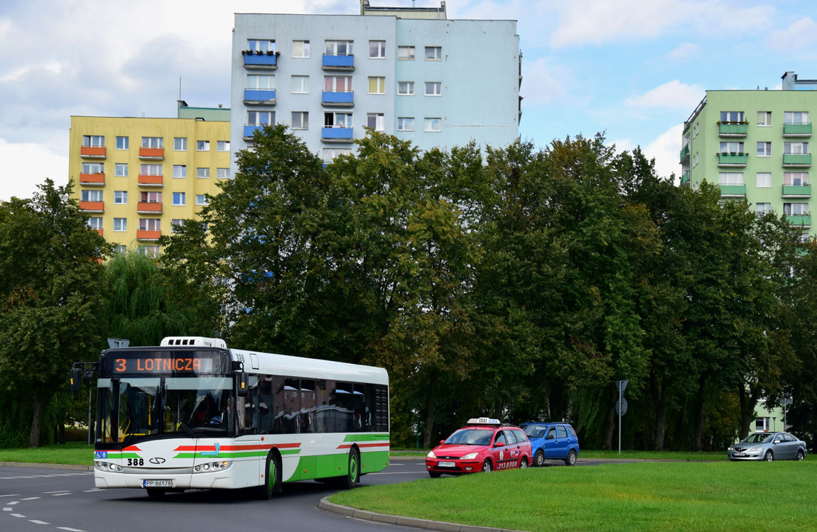 Solaris Urbino 12 #388.